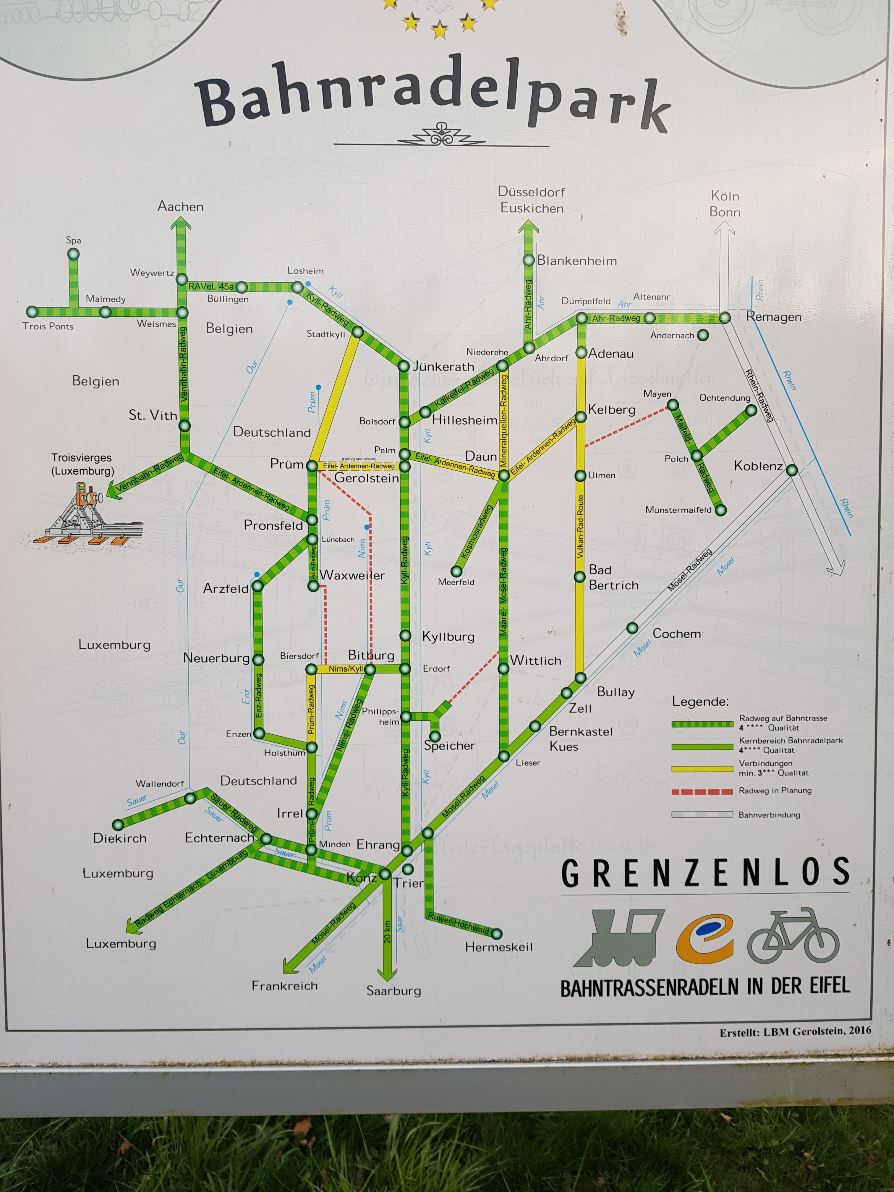 Diese Infotafel am ehemaligen Bahnhof Pronsfeld stellt die vorhandenen und geplanten Bahntrassenwege sowie Verbindungsstrecken dar.